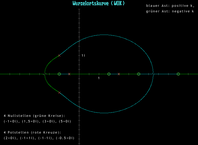 Darstellung einer Wurzelortskurve (Regelungstechnik)